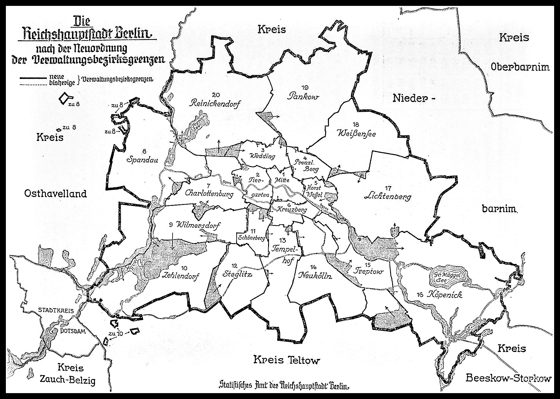 Die Reichshauptstadt Berlin nach der Neuordnung der Verwaltungsbezirksgrenzen